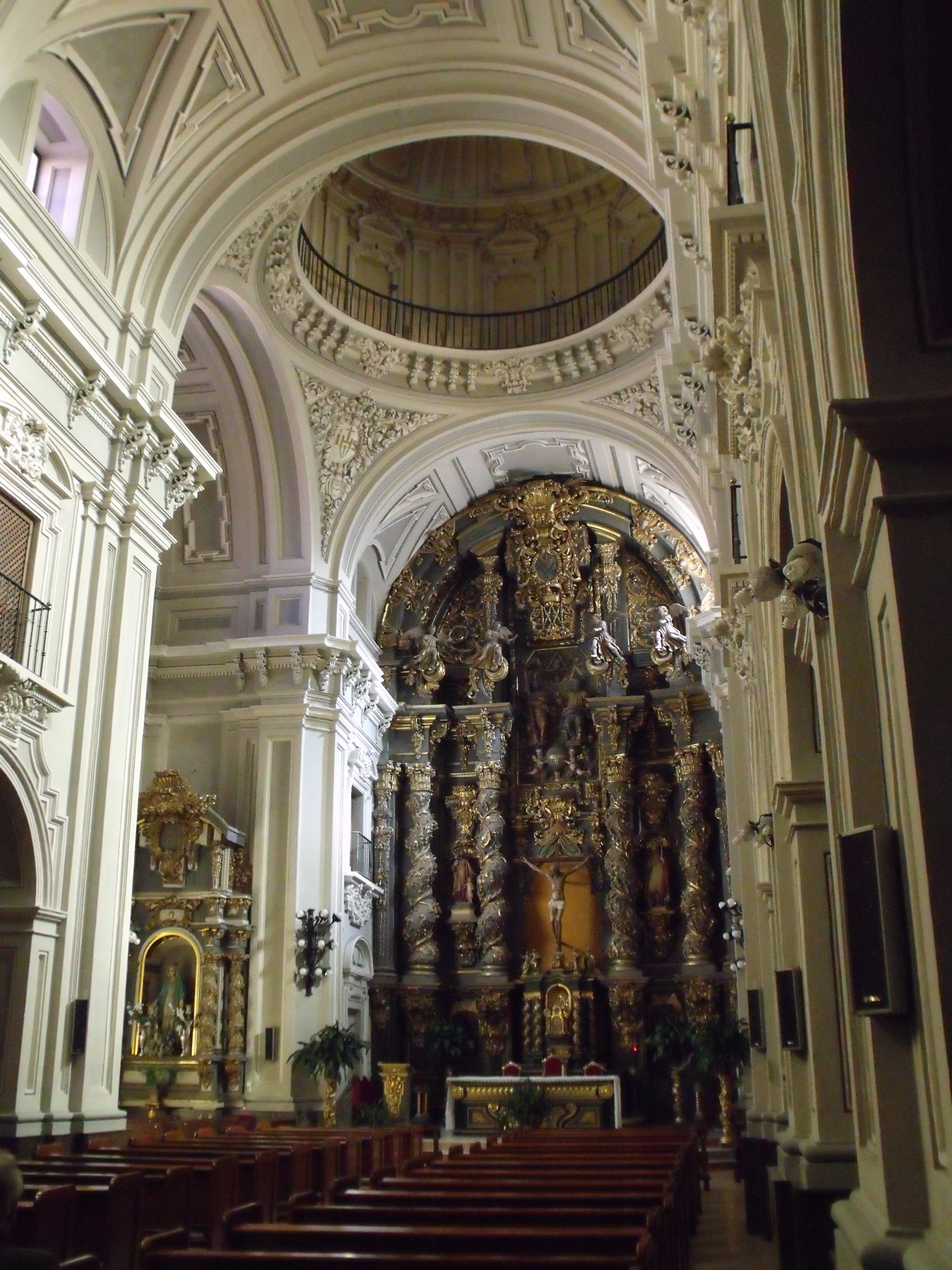 Parroquia de San Nicolas, en Guadalajara (España).